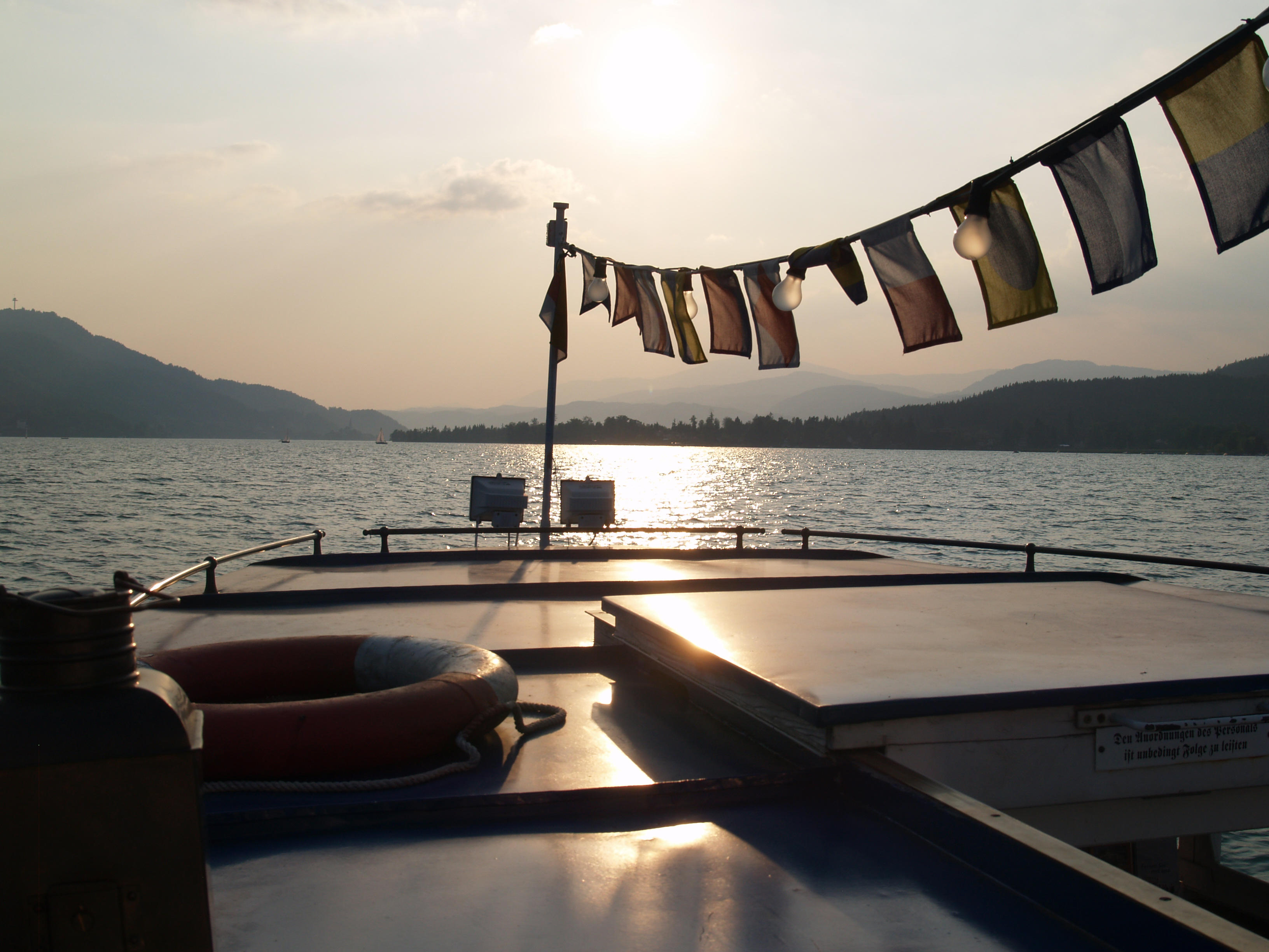 Abendstimmung am Nostalgieschiff "Lorlelei"